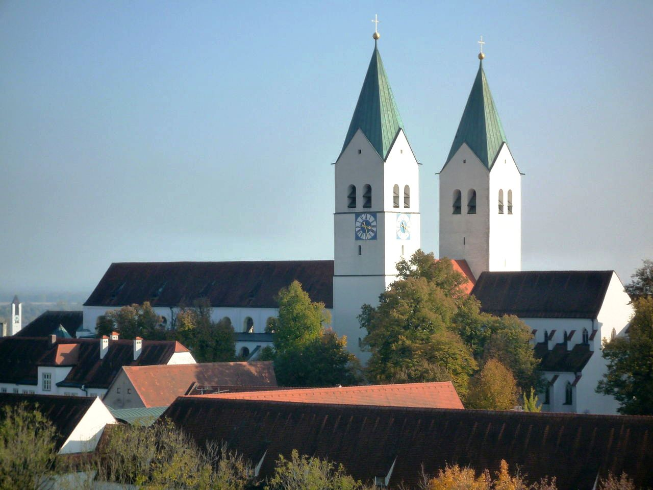 Freisinger Dom von Turm der St. Georgs-Kirche aus gesehen